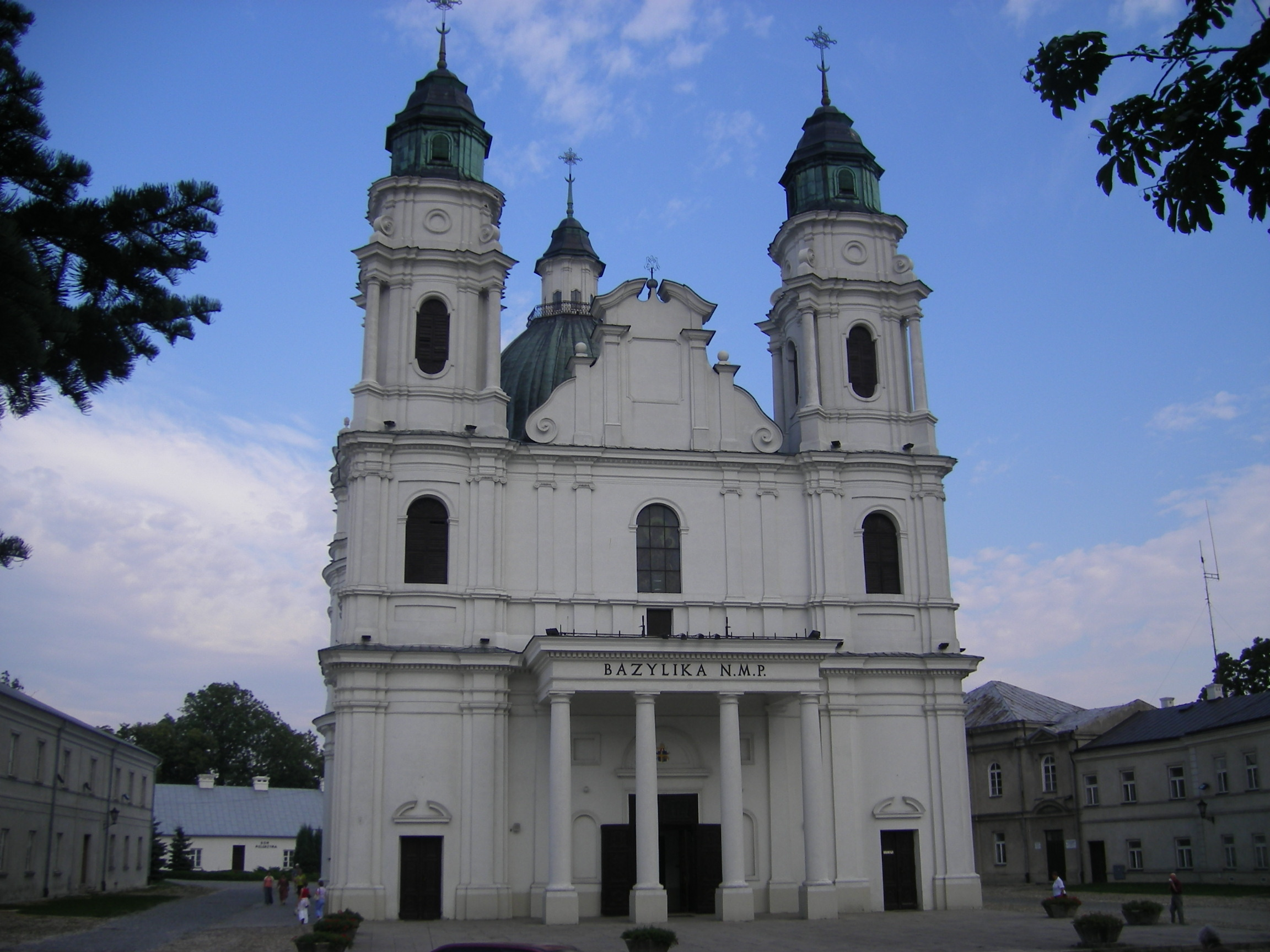 Chełm, Bazylika N.M.P.